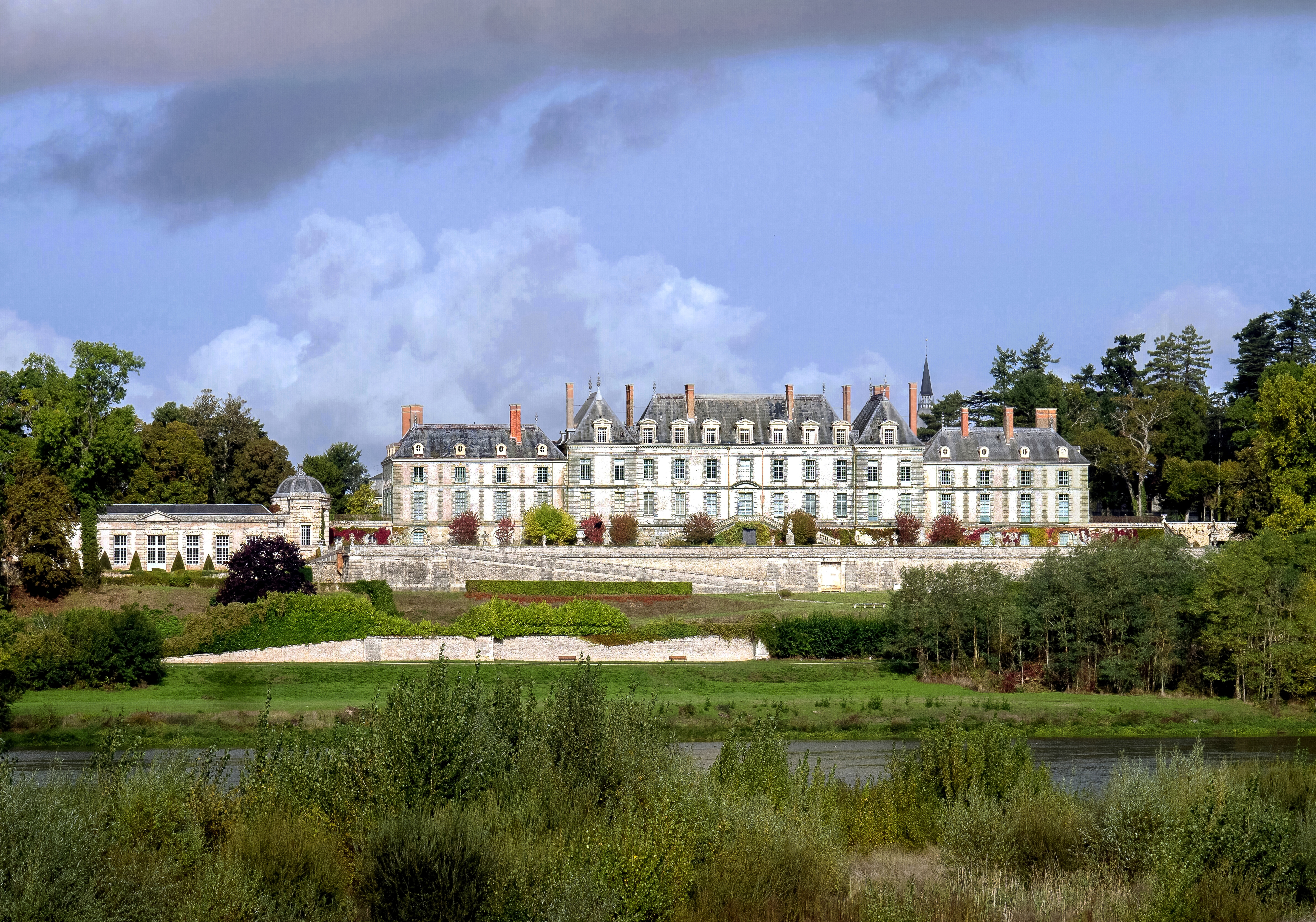 Schloss Menars, Blick vom gegenüberliegenden Ufer der Loire. Die berühmteste Besitzerin war Madame de Pompadour, die das Schloss 1760 erwarb und umbauen ließ, aber bereits 1764 verstarb.